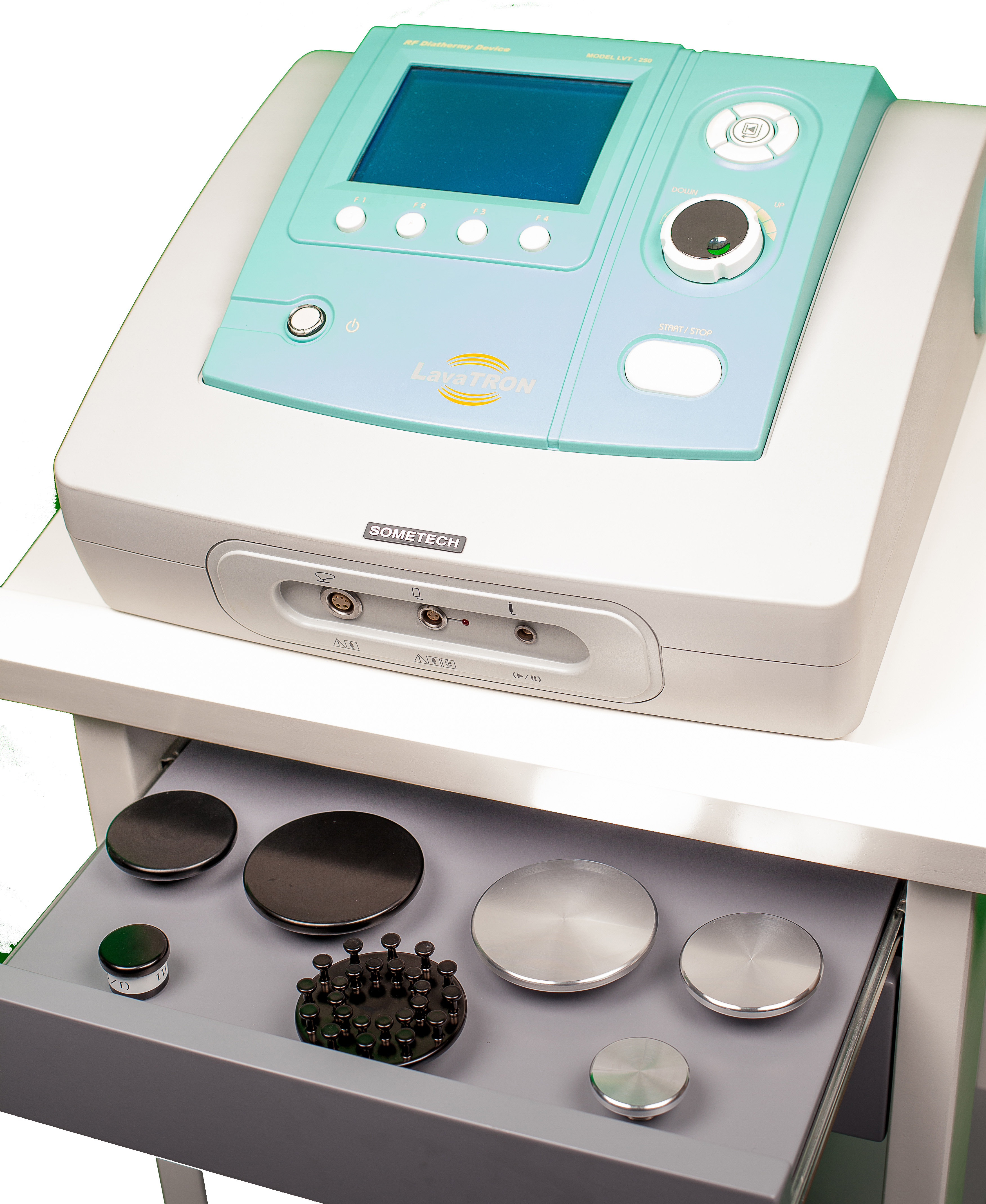 BIODIATERMIA® con Radiofrecuencia. CET & RET- Monopolar & Bipolar con Control Automático de Temperatura. Tratamiento en procesos agudos y crónicos.